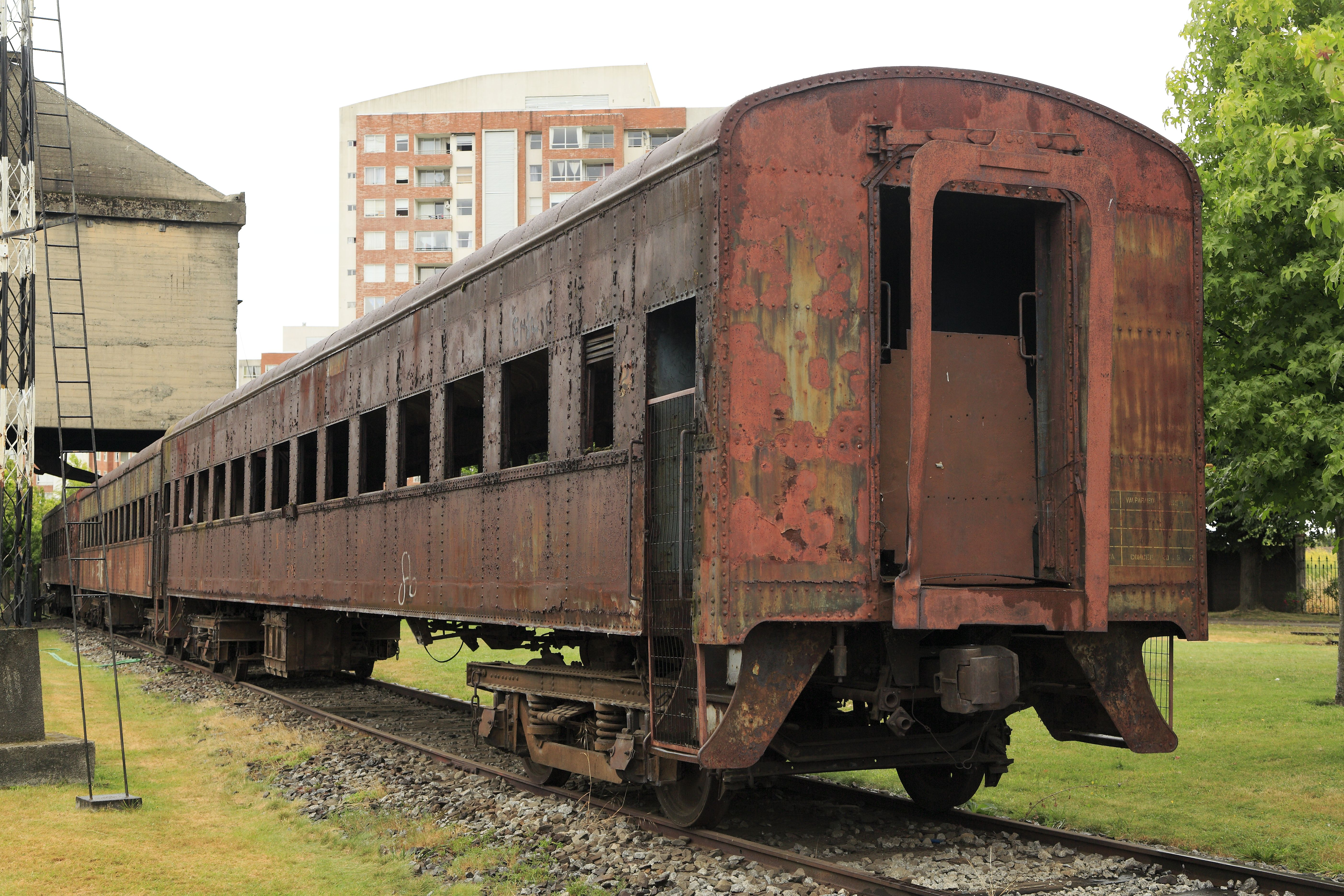 Reisezugwagen von LHB, in den 1920ern geliefert. Der Zustand ist schlecht, nur die stark korrodierten Wagenkästen und die Drehgestelle sind vorhanden.